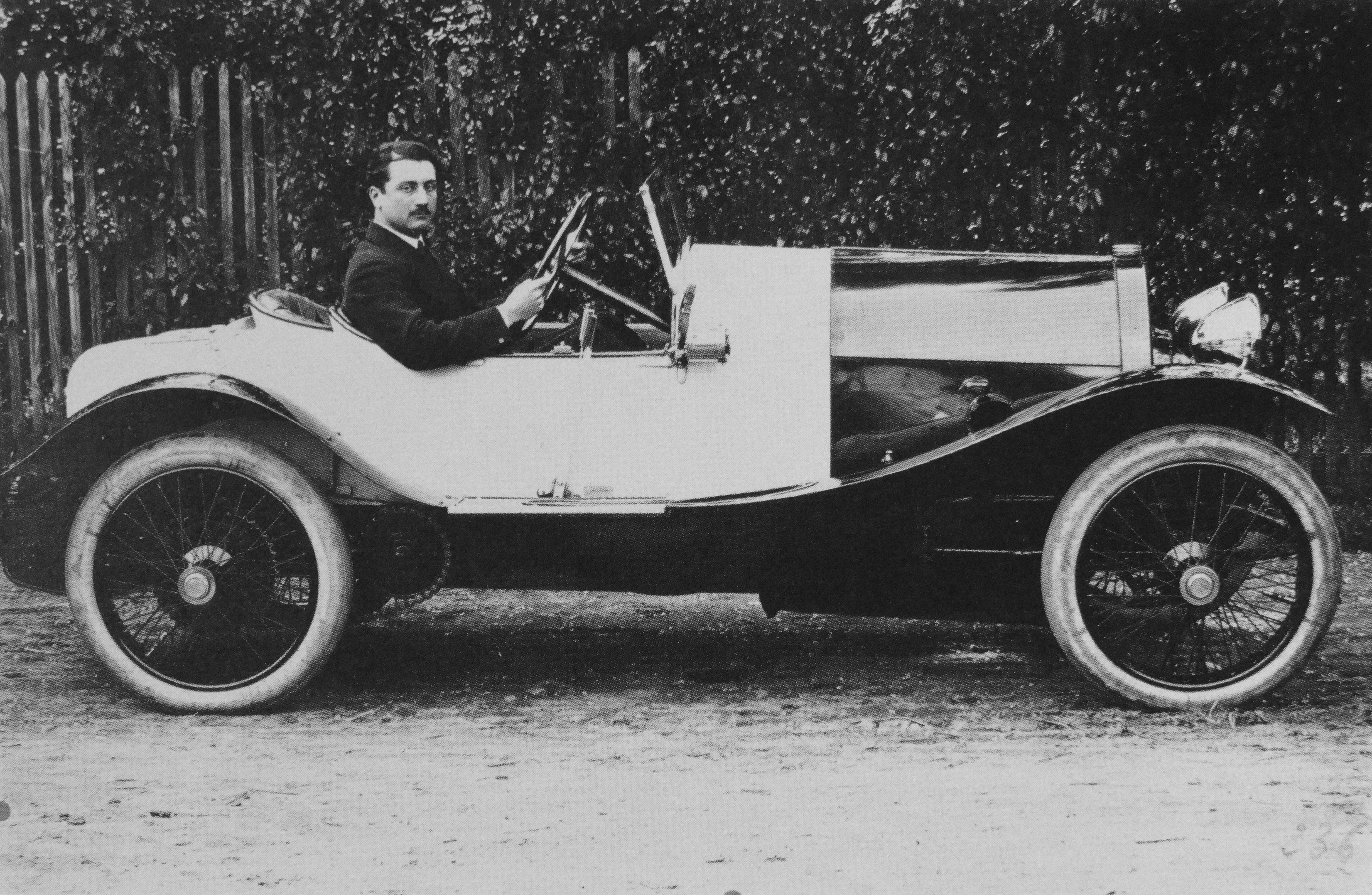 Roland Garros au volant d'Bugatti Type 18 " La Garros " vers 1910. Photographe inconnu. Archives Larousse.